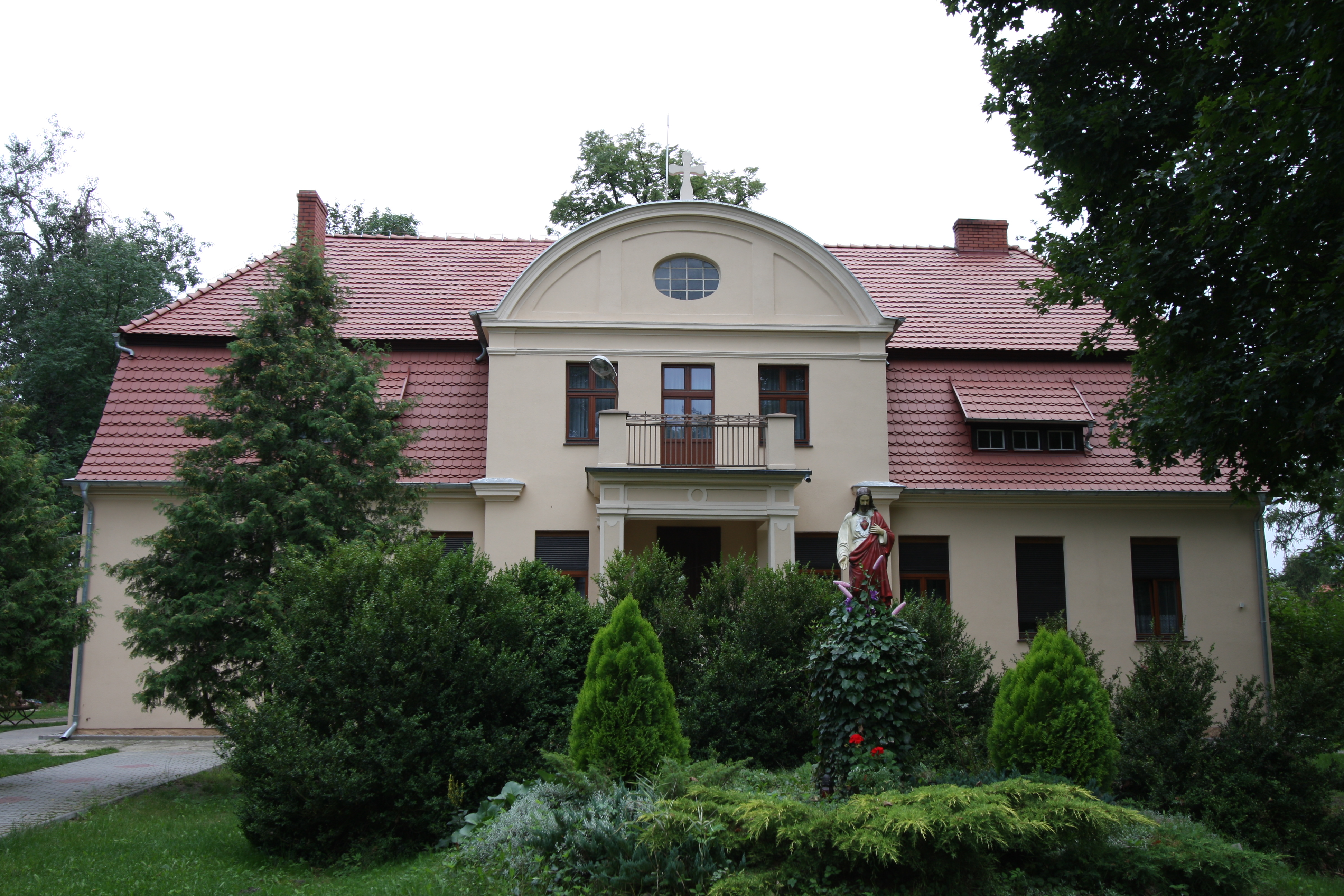 Tuchorza, pastorówka, ob. plebania (nr 45), przy kościele ewangelickim, ob. rzym.-kat. fil. p.w. śś. Apostołów Piotra i Pawła, mur., 1905-1906